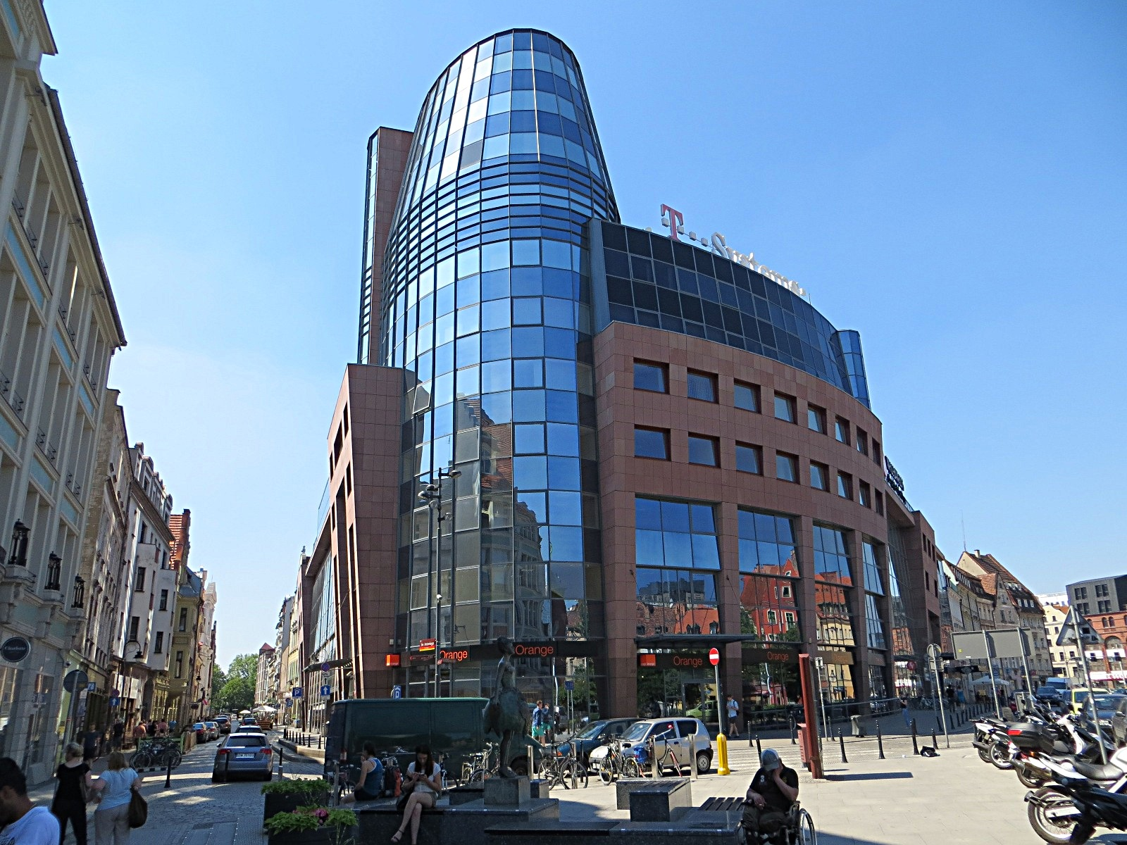 Świętego Antoniego